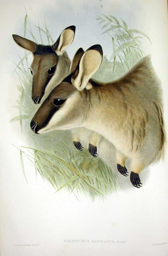 wallaby de l'ouest - Macropus irma